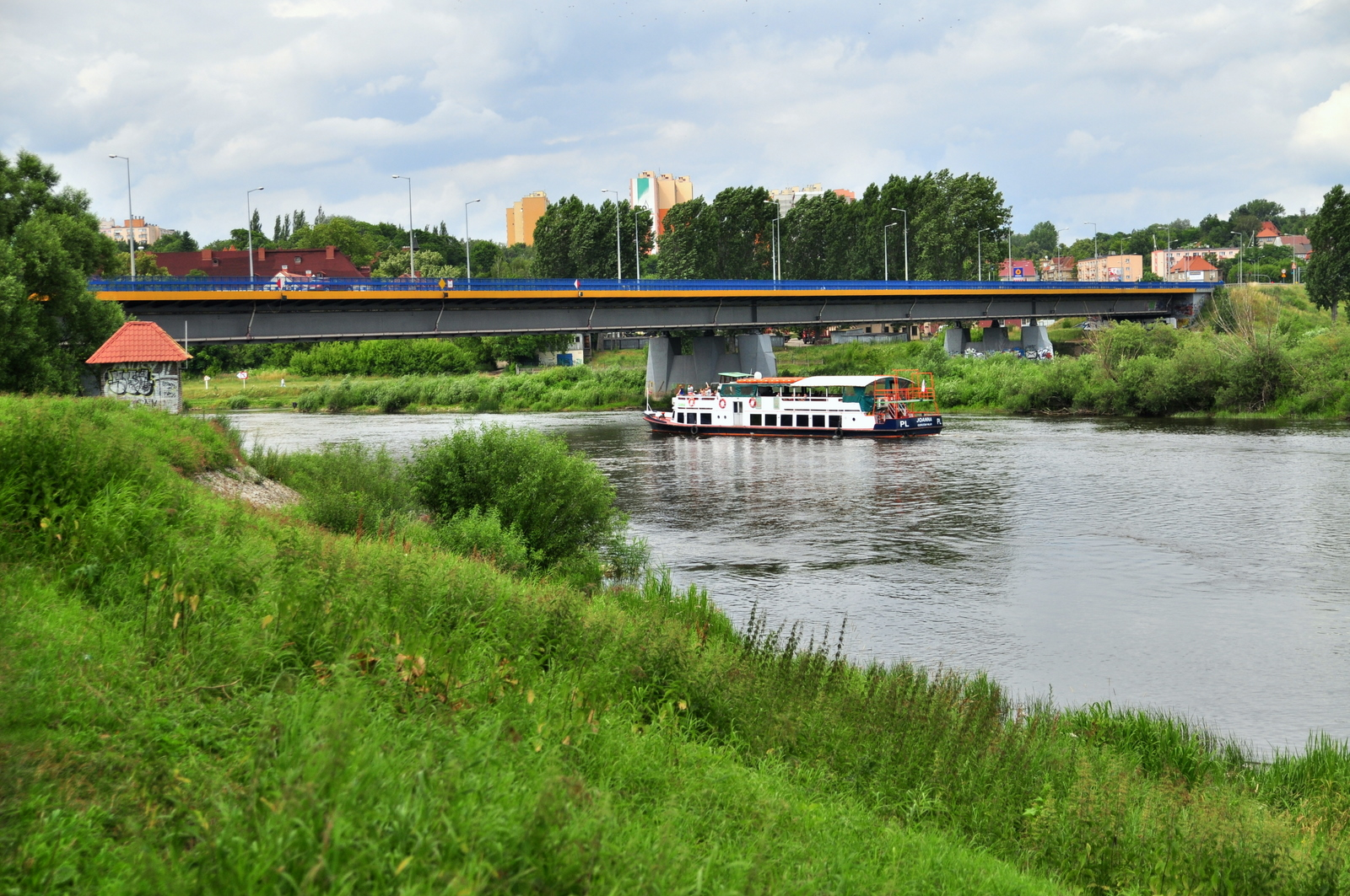 Most Lubuski